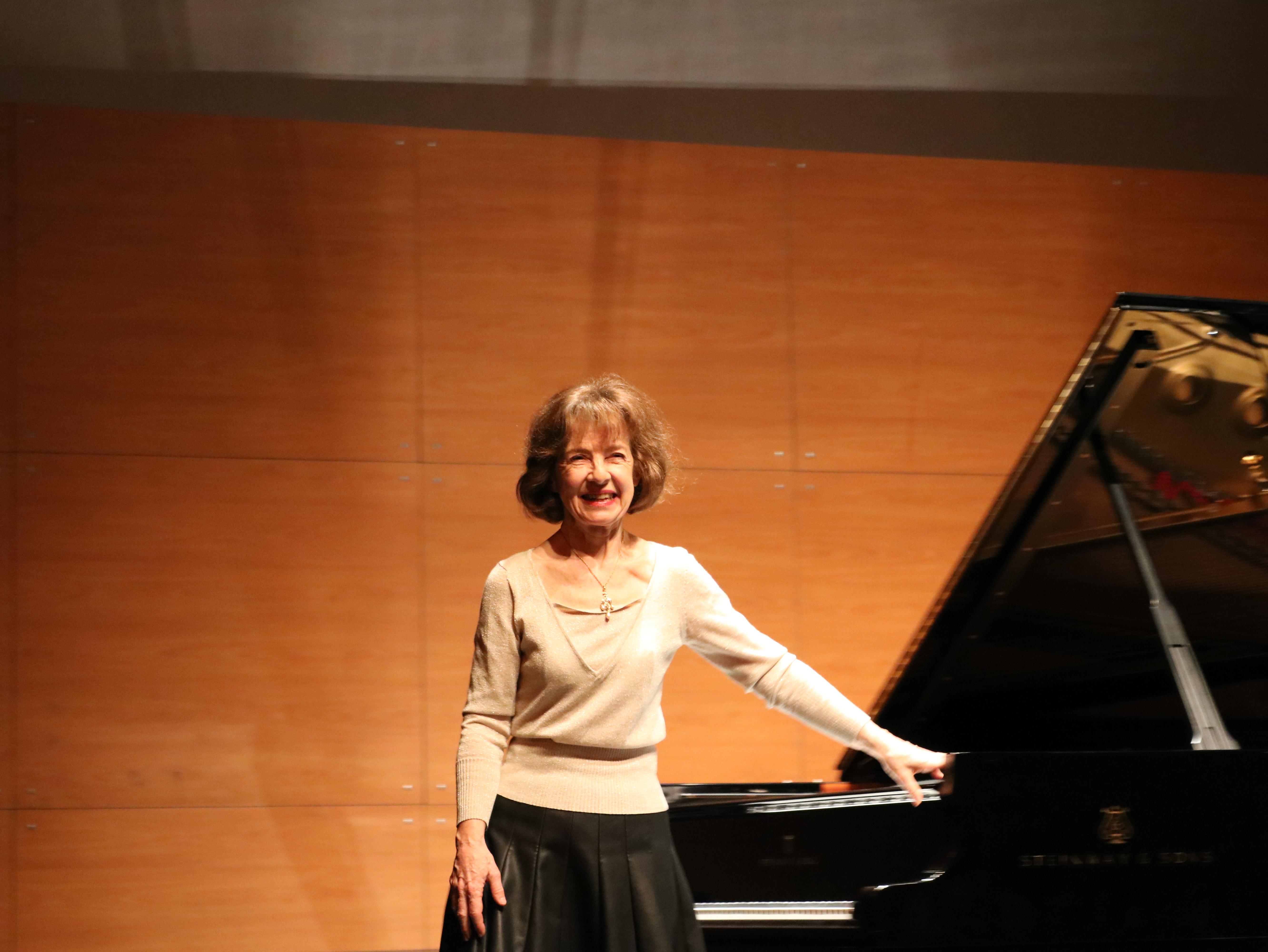 Anne Queffélec, pianiste, La folle Journée de Nantes 2017